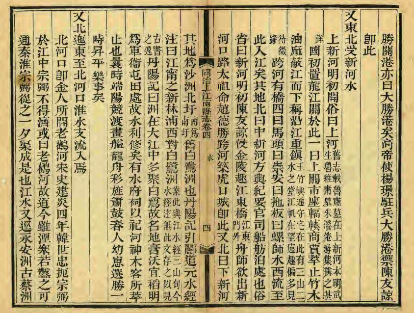 《同治上江兩縣誌》卷四，水志，第四頁。